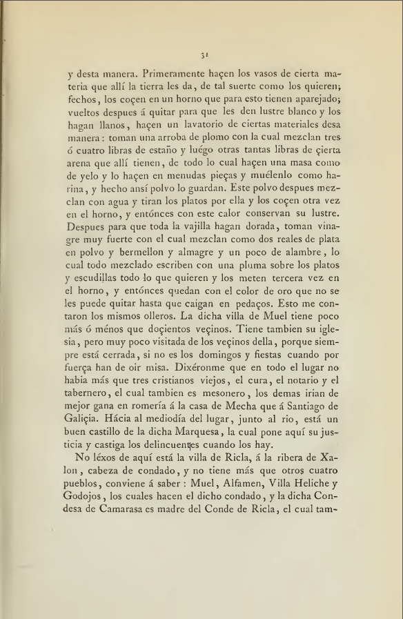 Descripción de como se realizan los reflejos metálicos. Relación del viaje hecho por Felipe II en 1585, à Zaragoza, Barcelona y Valencia (1876). Author: Cock, Henrique; Morel-Fatio, Alfred, 1850-1924; Rodríguez Villa, Antonio, 1843-1912.